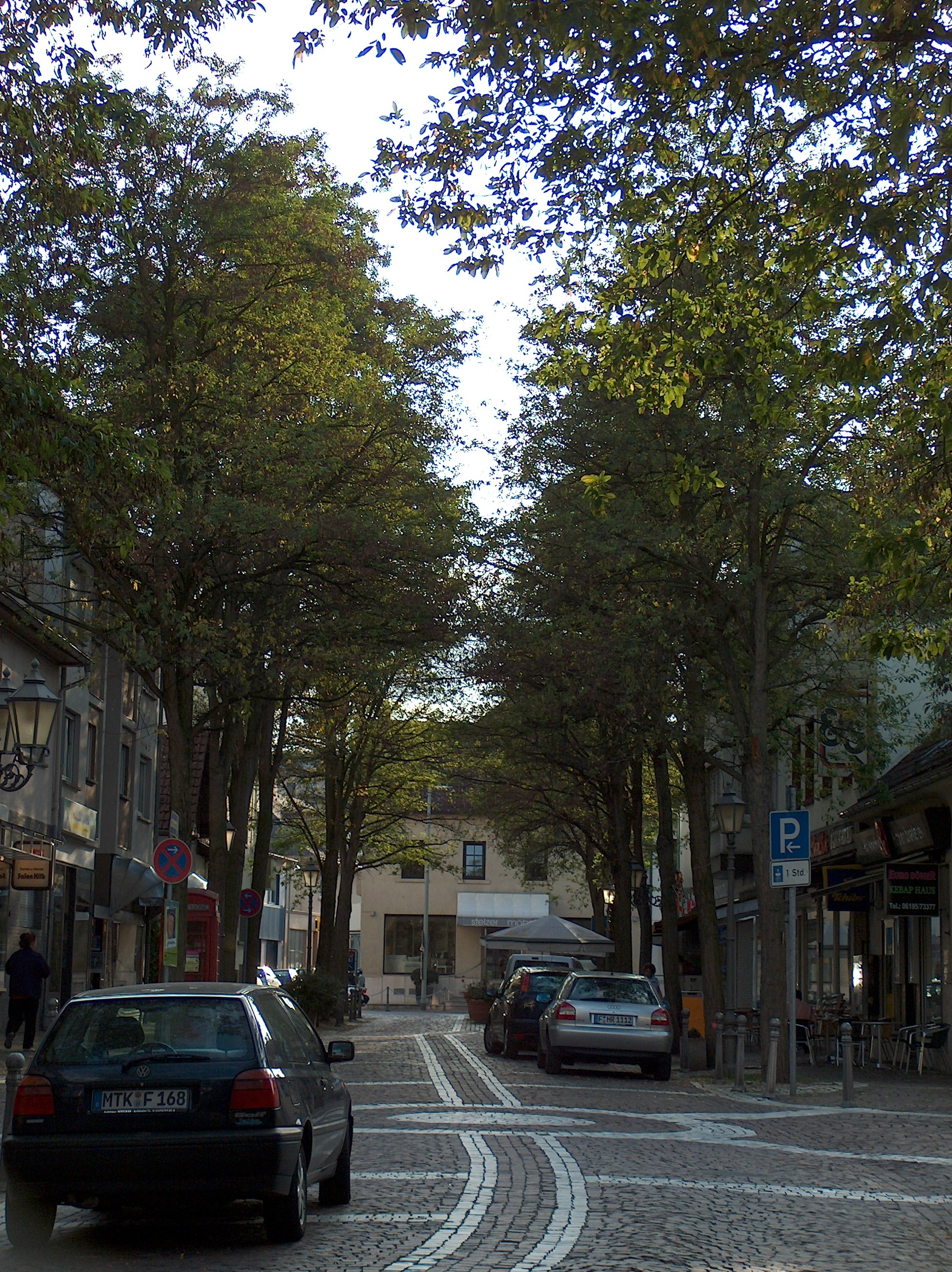 en.: Bahnstraße at Kelkheim, Germany. dt.:Bahnstraße, Kelkheims (Hessen) kleine Einkaufsstraße.